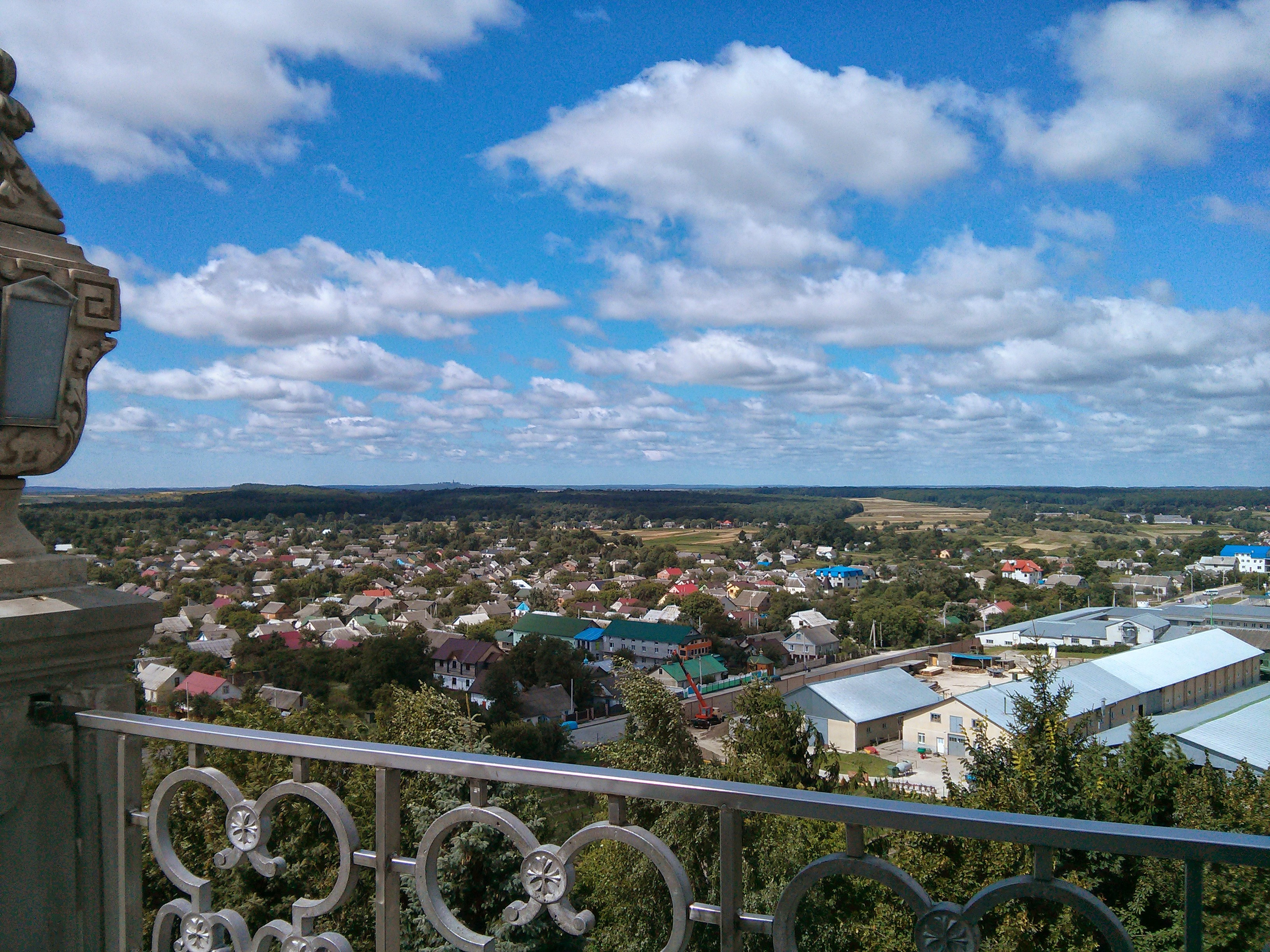 Pochaiv, Ternopil's'ka oblast, Ukraine